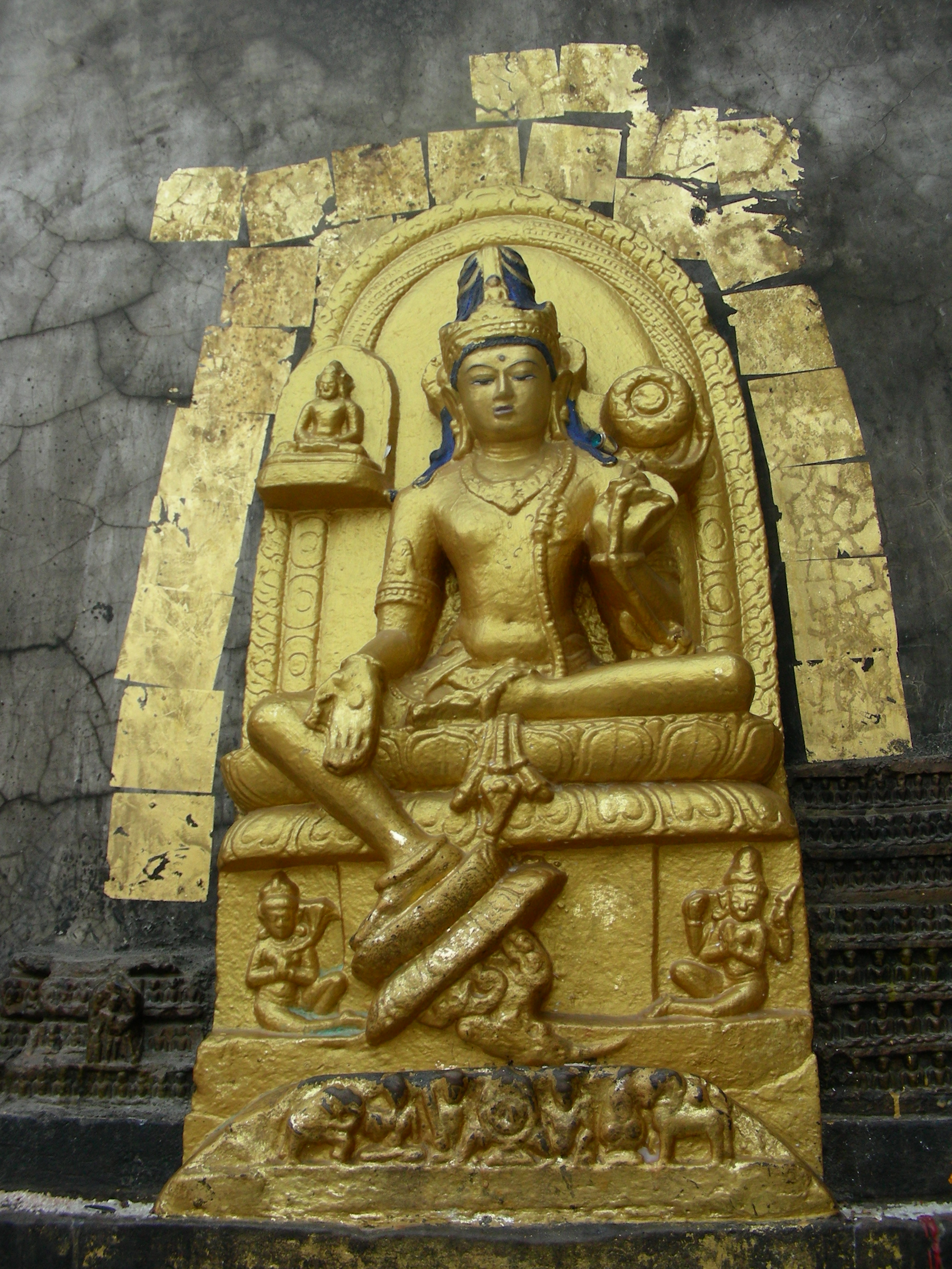 在菩提迦耶大覺塔的蓮華手菩薩(觀自在菩薩)像